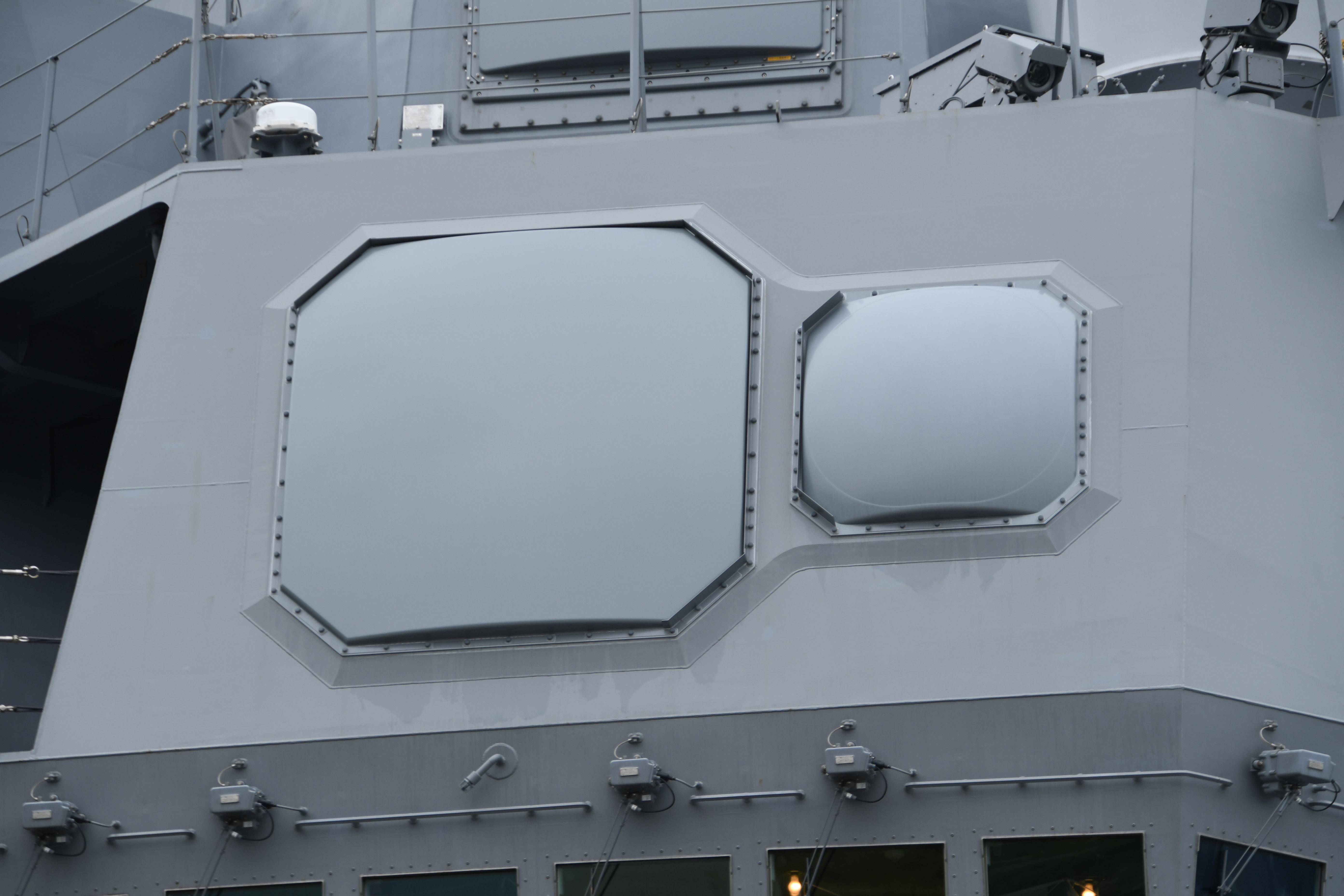 海上自衛隊 護衛艦しらぬい（DD-120） 艦橋上部のOPY-1多機能レーダー 右舷前面。2019年10月14日 舞鶴基地にて。